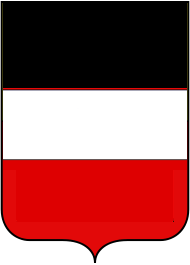 Fagagna, stemma